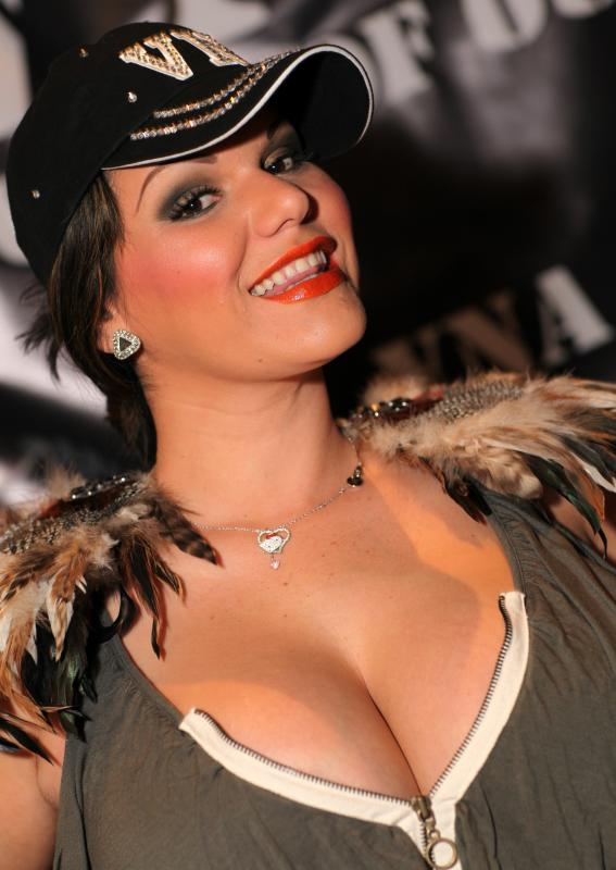 Angelina Castro at AEE Expo in Las Vegas.